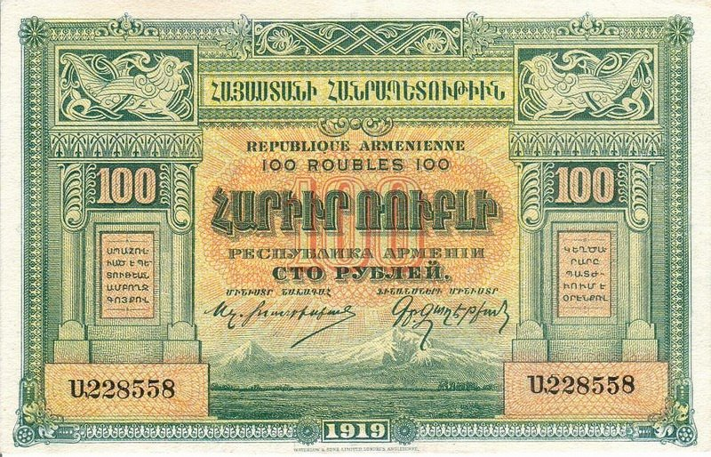 100 rublos